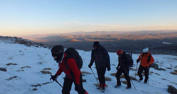 Helvadere de Dağcılık